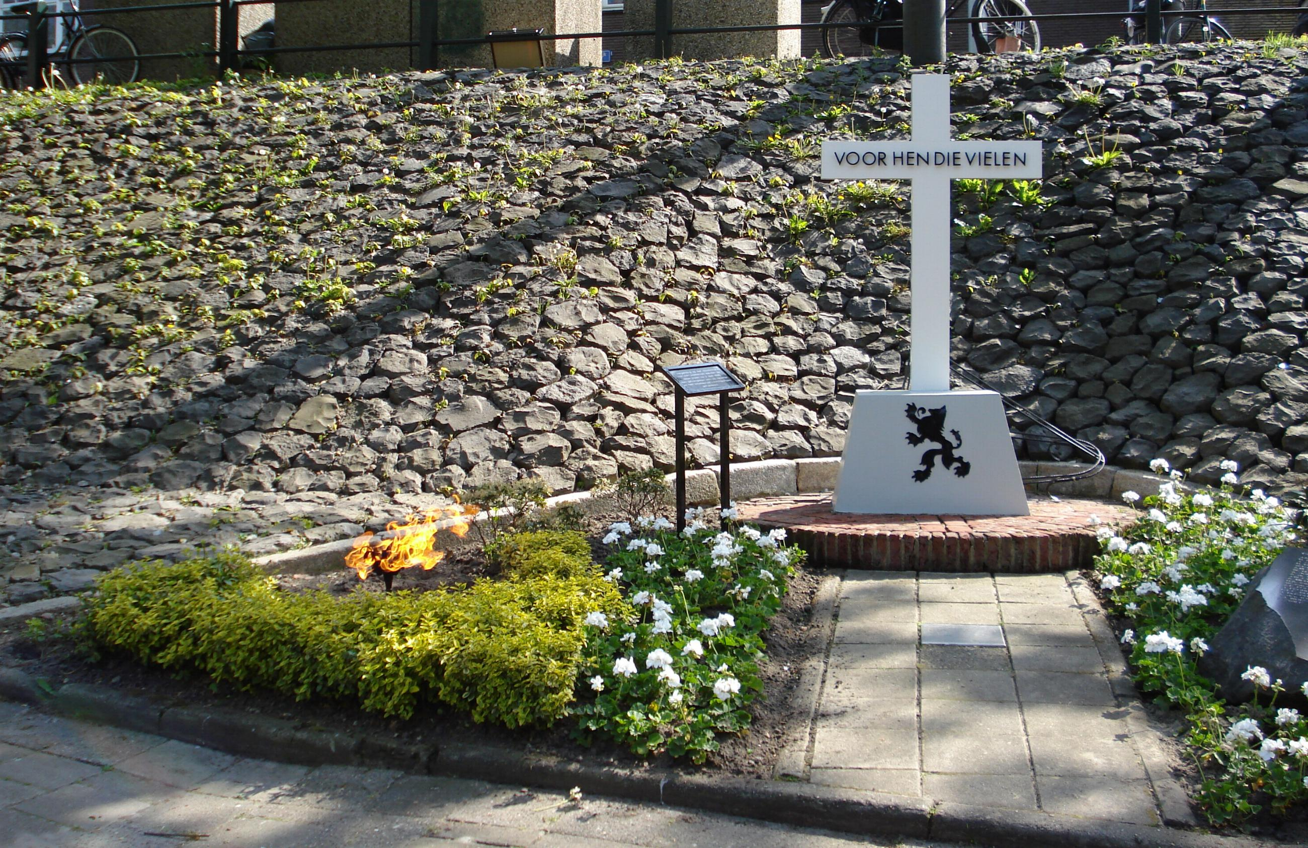 Rotterdam, Kralingen. Herdenkingsmonument aan de Oostzeedijk Beneden. Rotterdam/The Netherlands